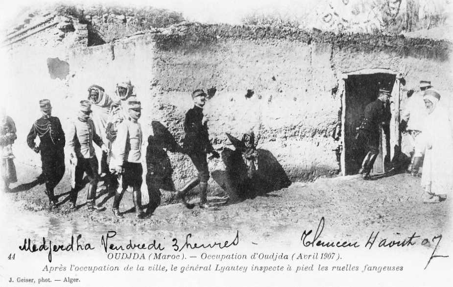 Lyautey à Oujda, avril 1907